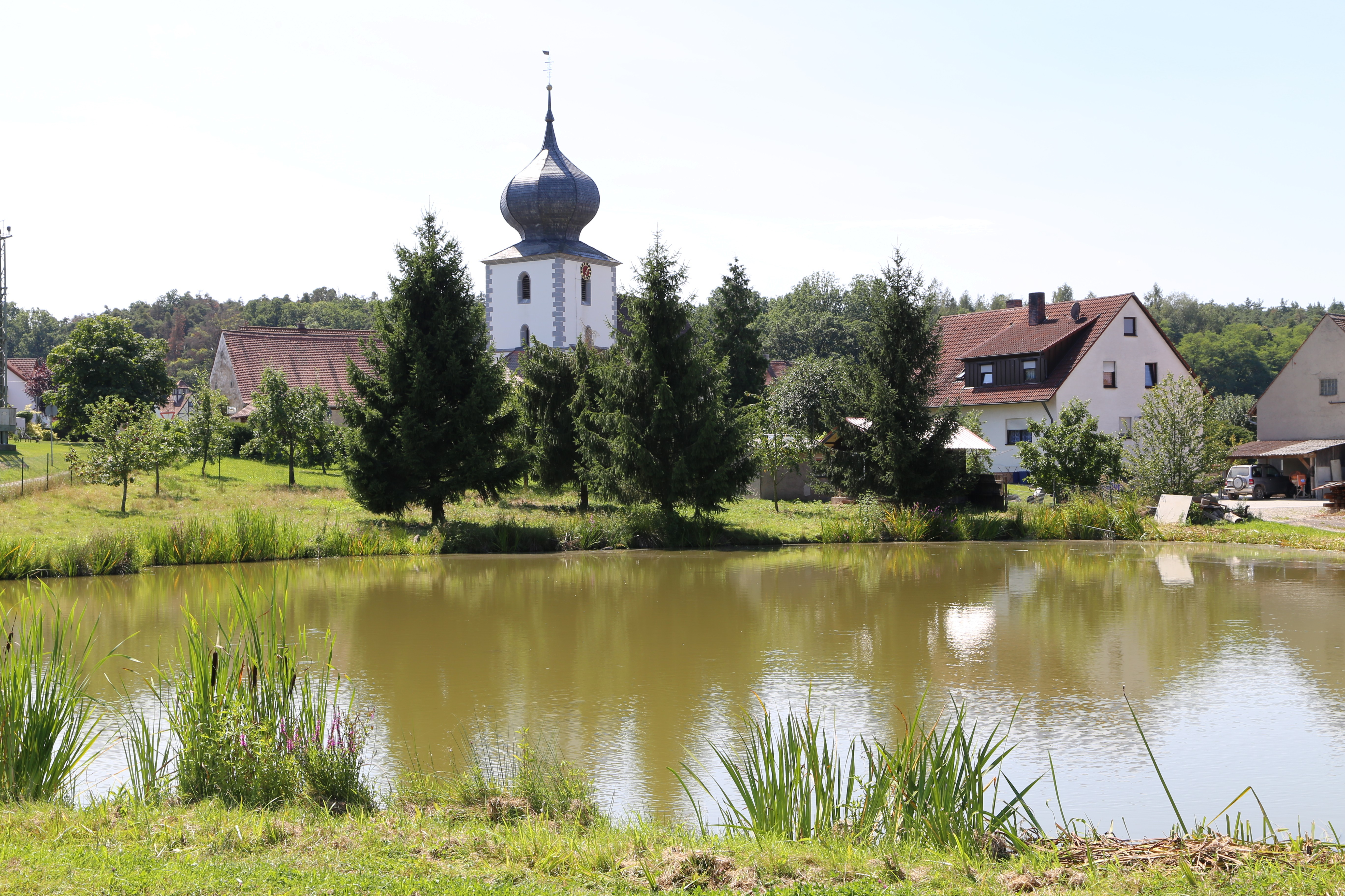 Ailersbach, Höchstadt an der Aisch; Katholische Filialkirche St. Martin, gotische Chorturmanlage mit barocker Zwiebelhaube und gotischem Langhaus, auf der Nordseite ein Sakristeianbau, Mitte 15. Jahrhundert, Barockisierung zweite Hälfte 18. Jahrhundert; mit Ausstattung